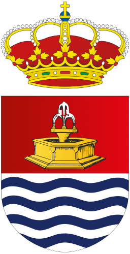 Escudo